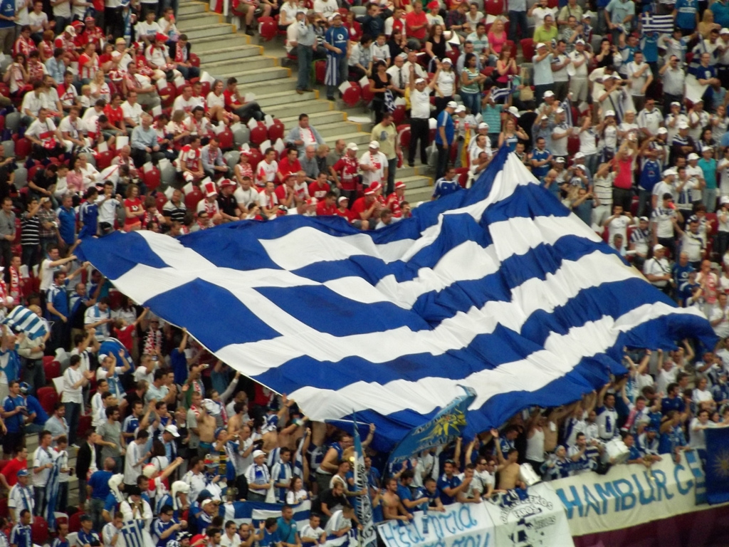 Zdjęcie zrobione w pierwszym dniu UEFA Euro 2012 w Warszawie, dniu otwarcia turnieju i meczu Polska-Grecja.